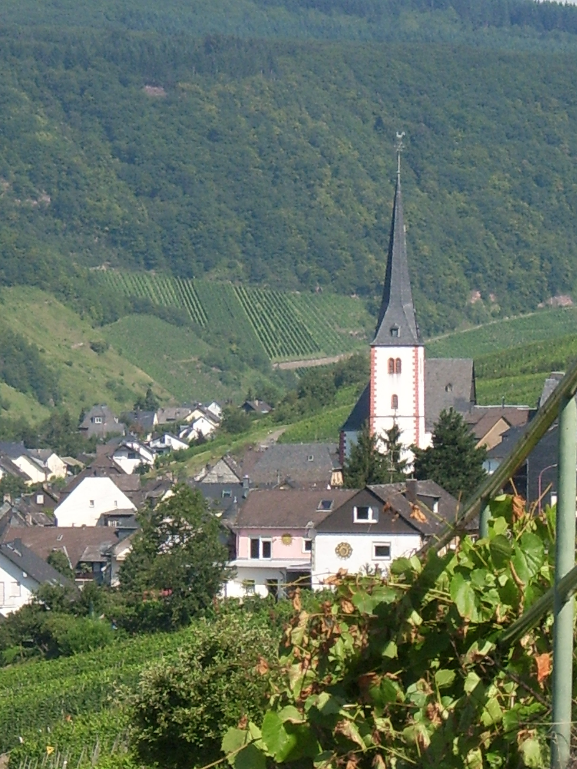 Enkircher view, with the church. (Foto Ruben A. Koman, 2011)